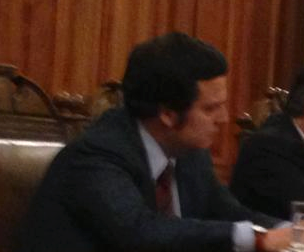 Herrera Presentación Libro Voces Reconciliación 2013